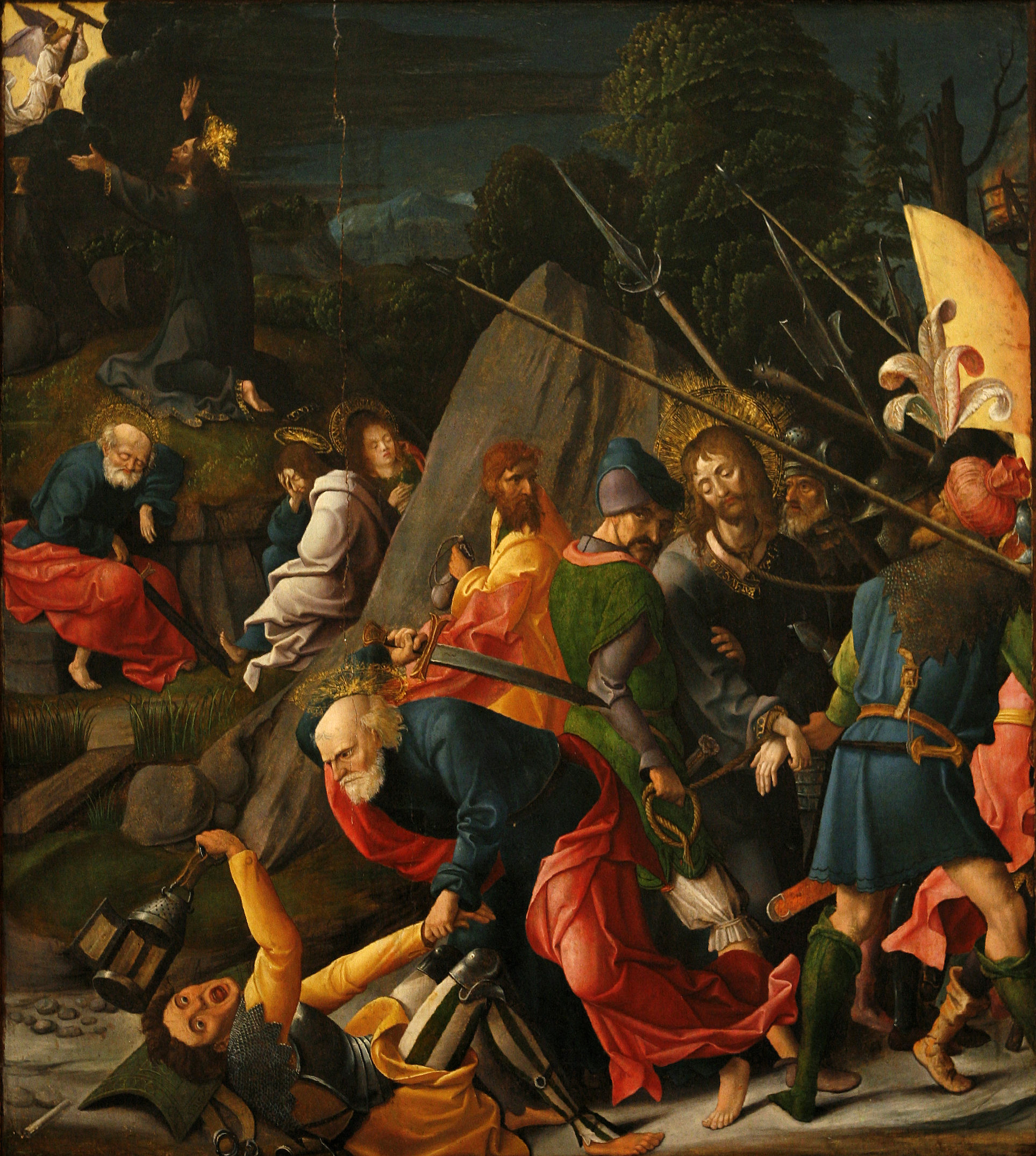 detail